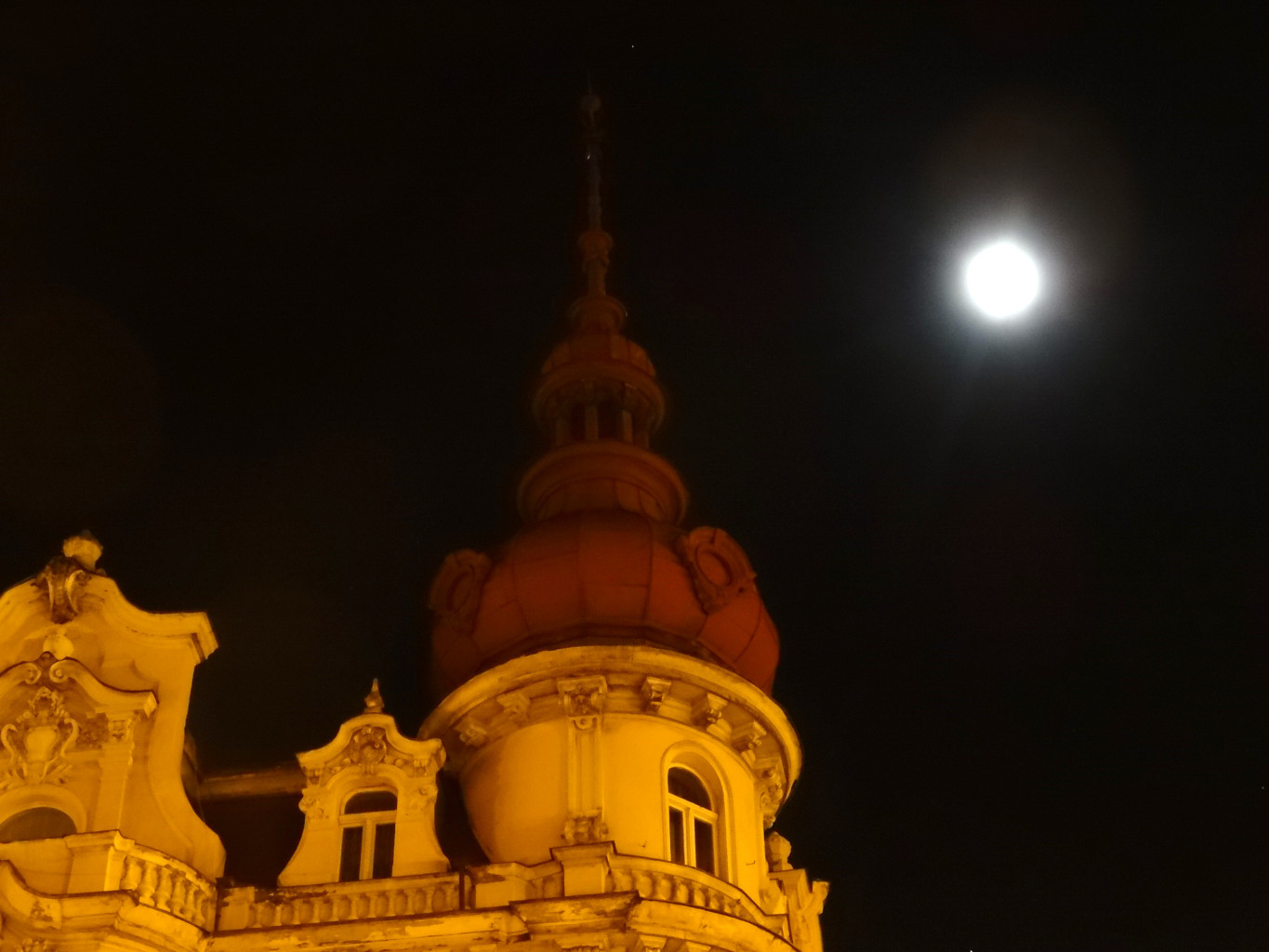 Kamienica Plac Wolności 1 w Bydgoszczy, róg ul. Gdańskiej (1898, aut. Józef Święcicki)